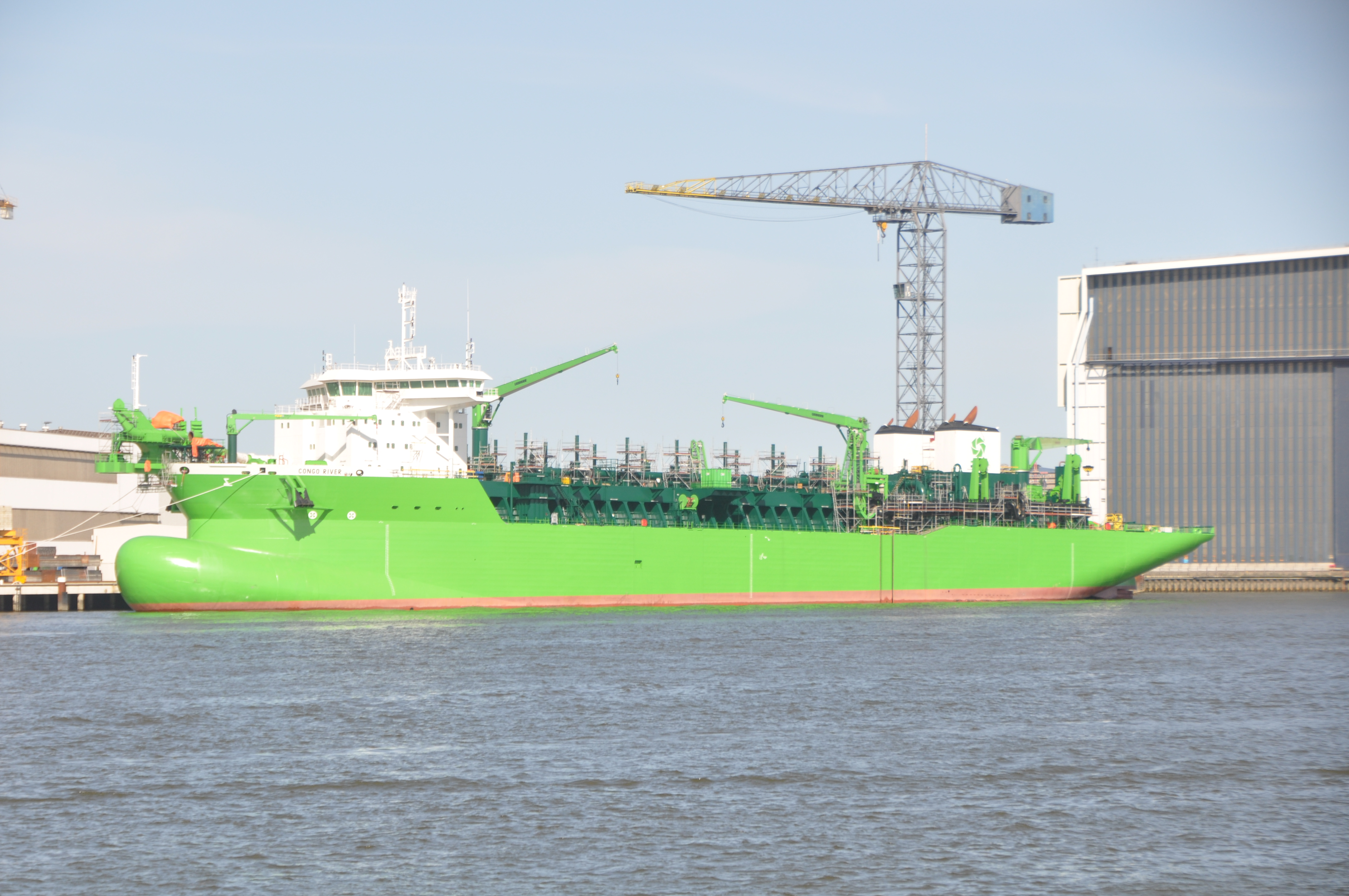 De CONGO RIVER voor de werf in Krmpen aan den IJssel.